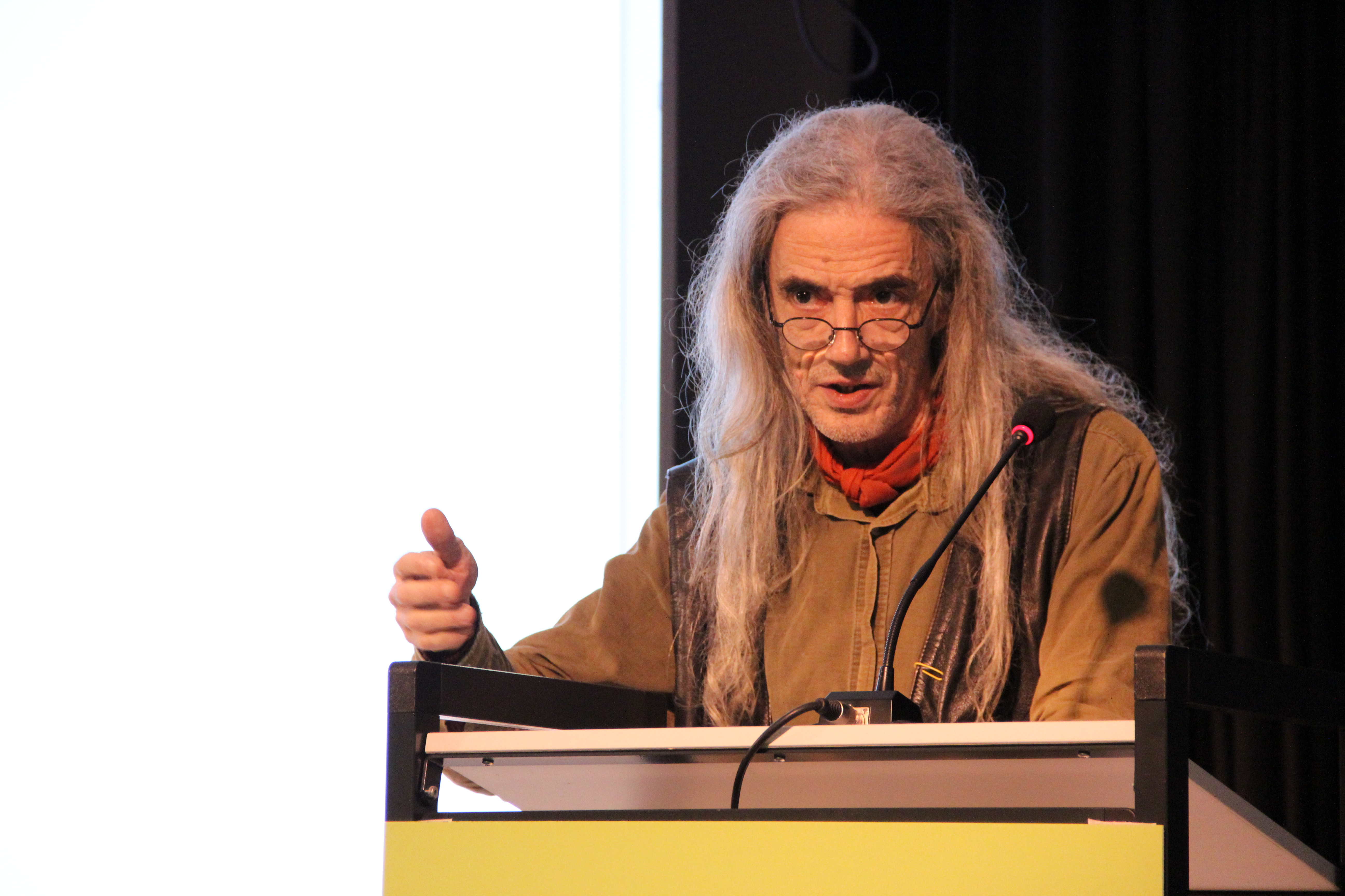 Enric Casasses i Falgueres és un poeta i traductor català.